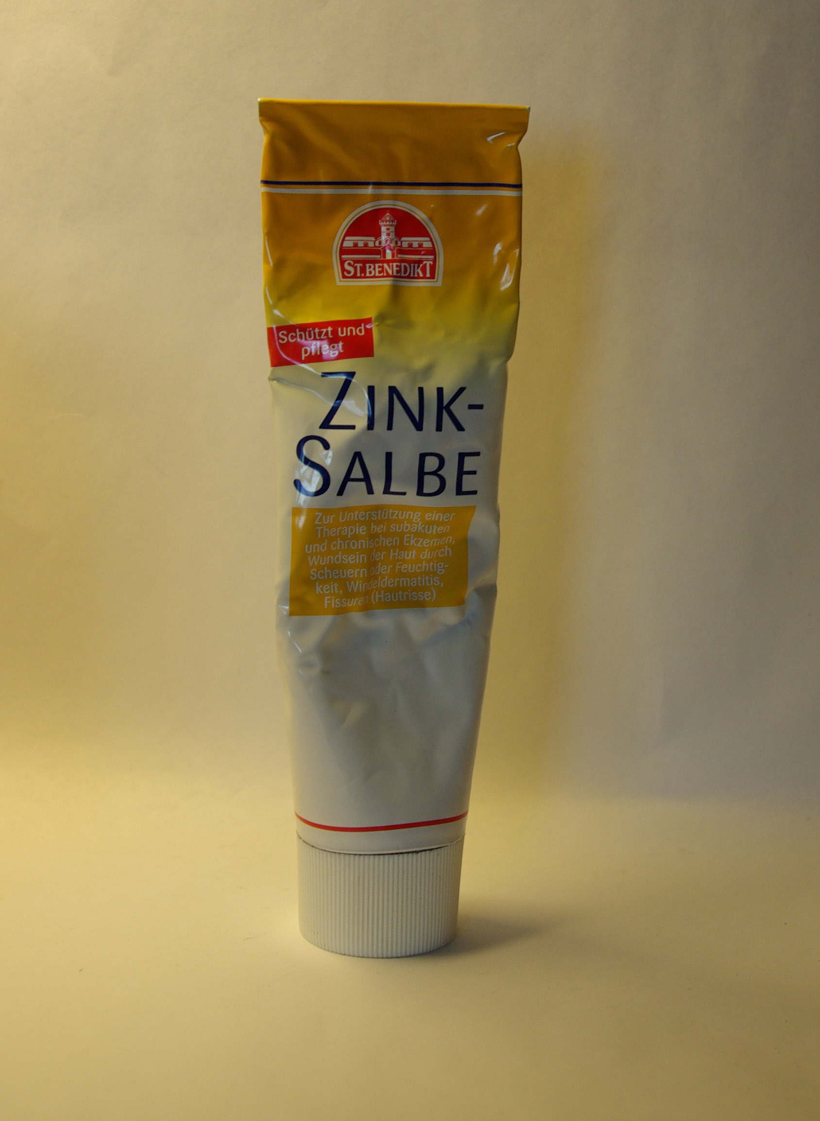 Tube mit Zinksalbe